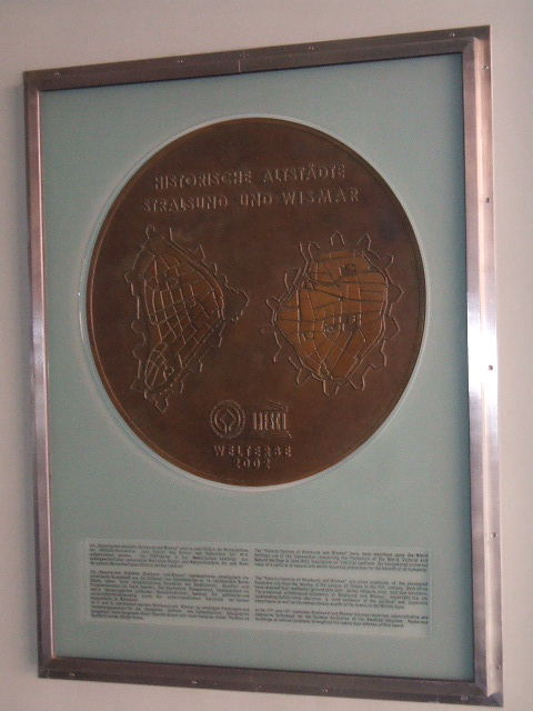 Stralsund, Germany, Plakette zur Verleihung des Status als Weltkulturerbe der UNESCO, befindet sich im Buttergang des Stralsunder Rathauses